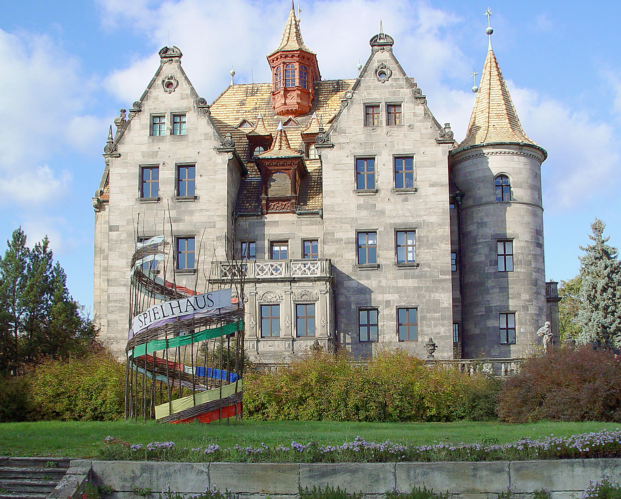 Richtersche Villa in Rudolstadt